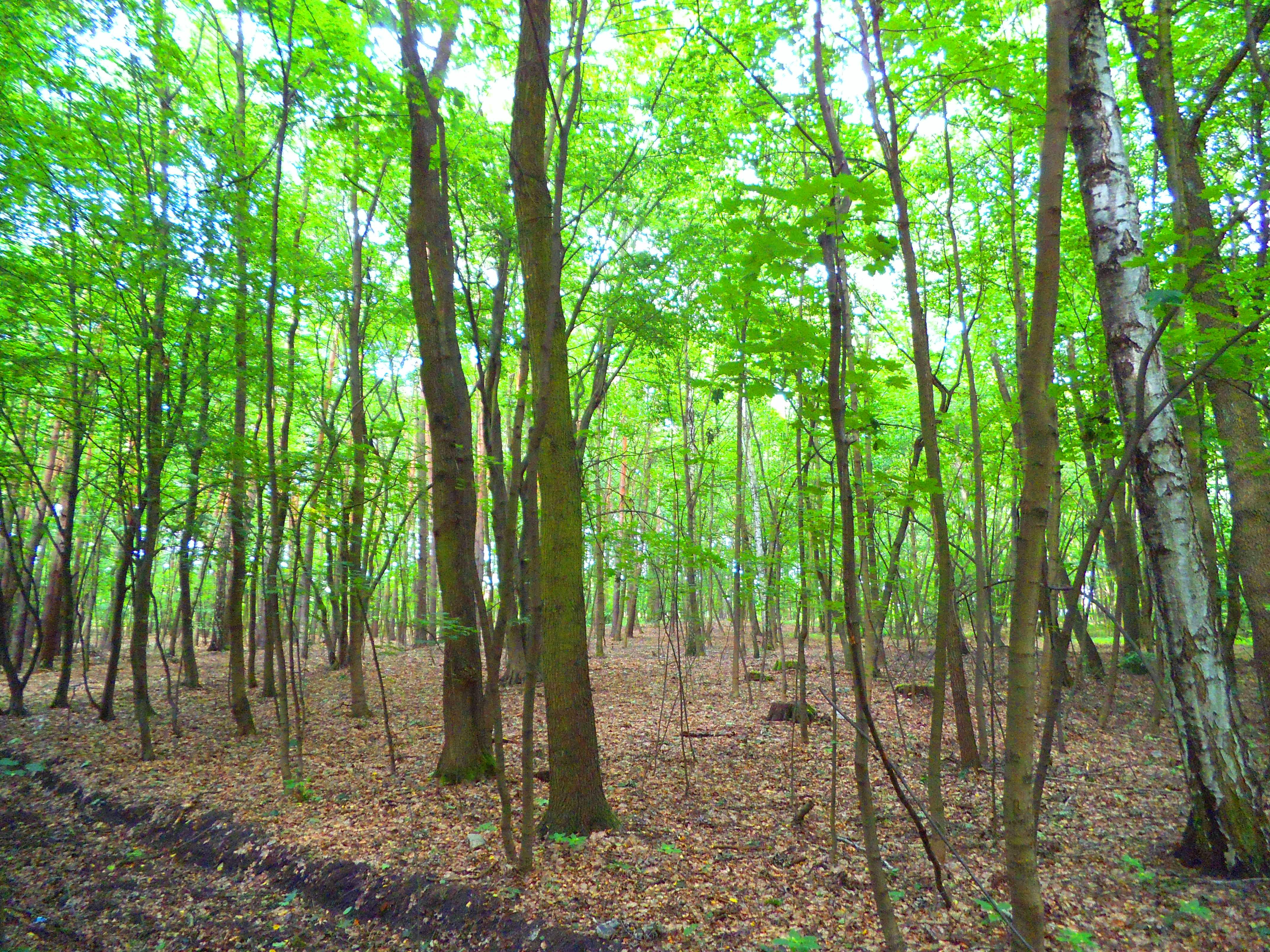 Las Barbarka w Toruniu